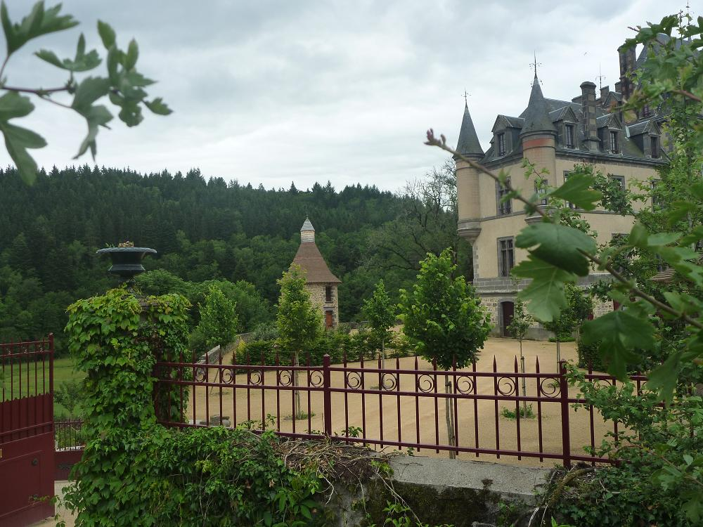 Cour d'honneur du Chateau de Miremont (63)